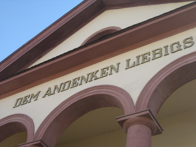 Liebigmuseum Gießen